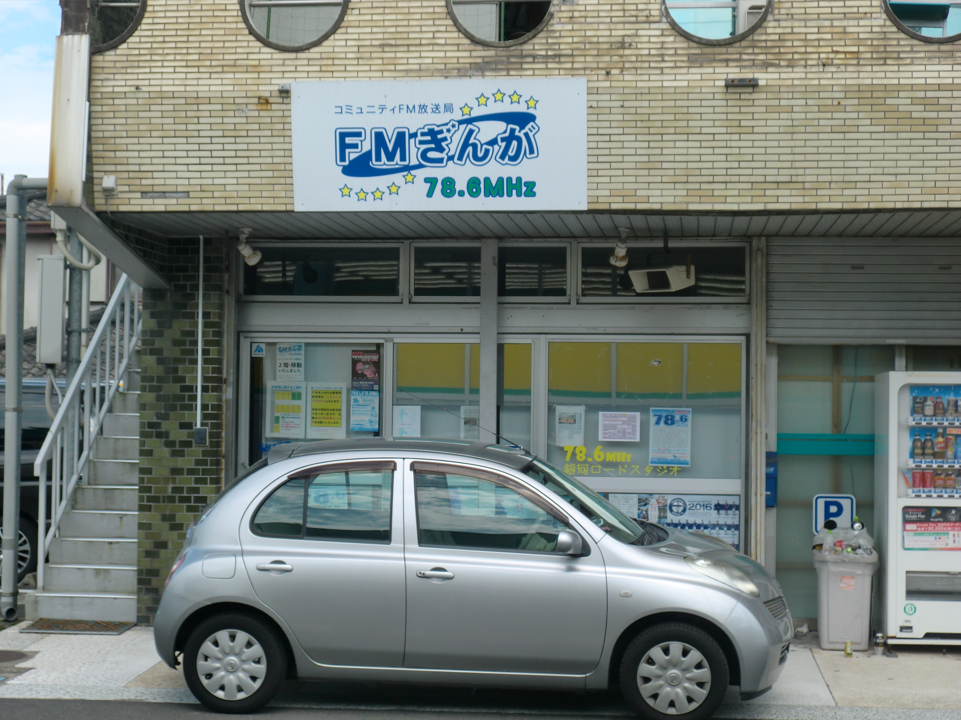 鹿児島市にあるFMぎんがスタジオ